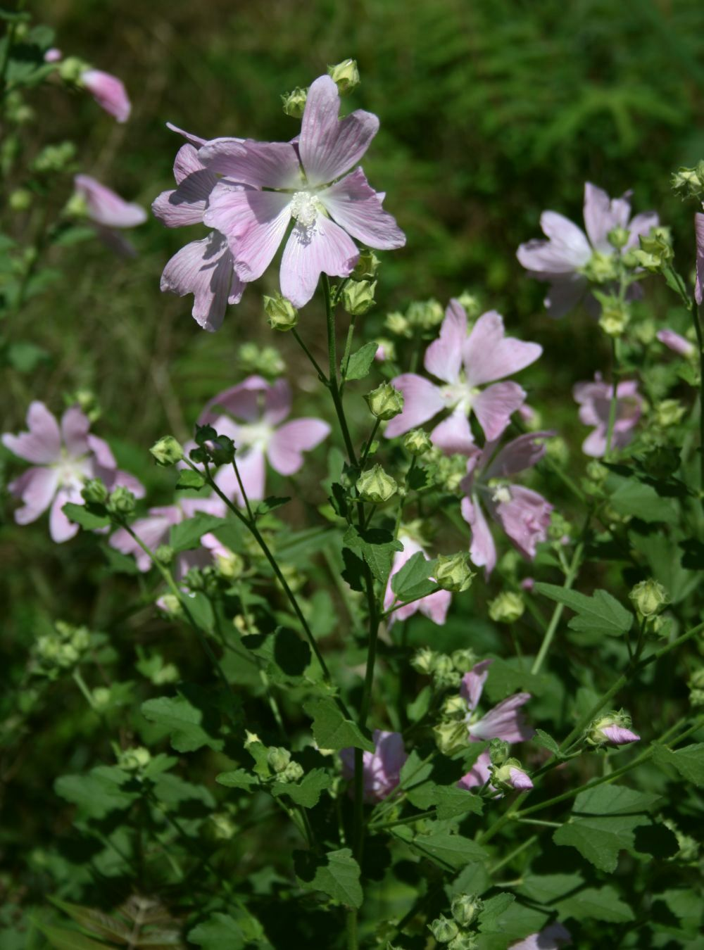 Thüringer Strauchpappel (Lavatera thuringiaca), Malvengewächse (Malvaceae) - Österreich/Austria/Autriche: Niederösterreich, Wiener Becken, Goldwald W Ebergassing